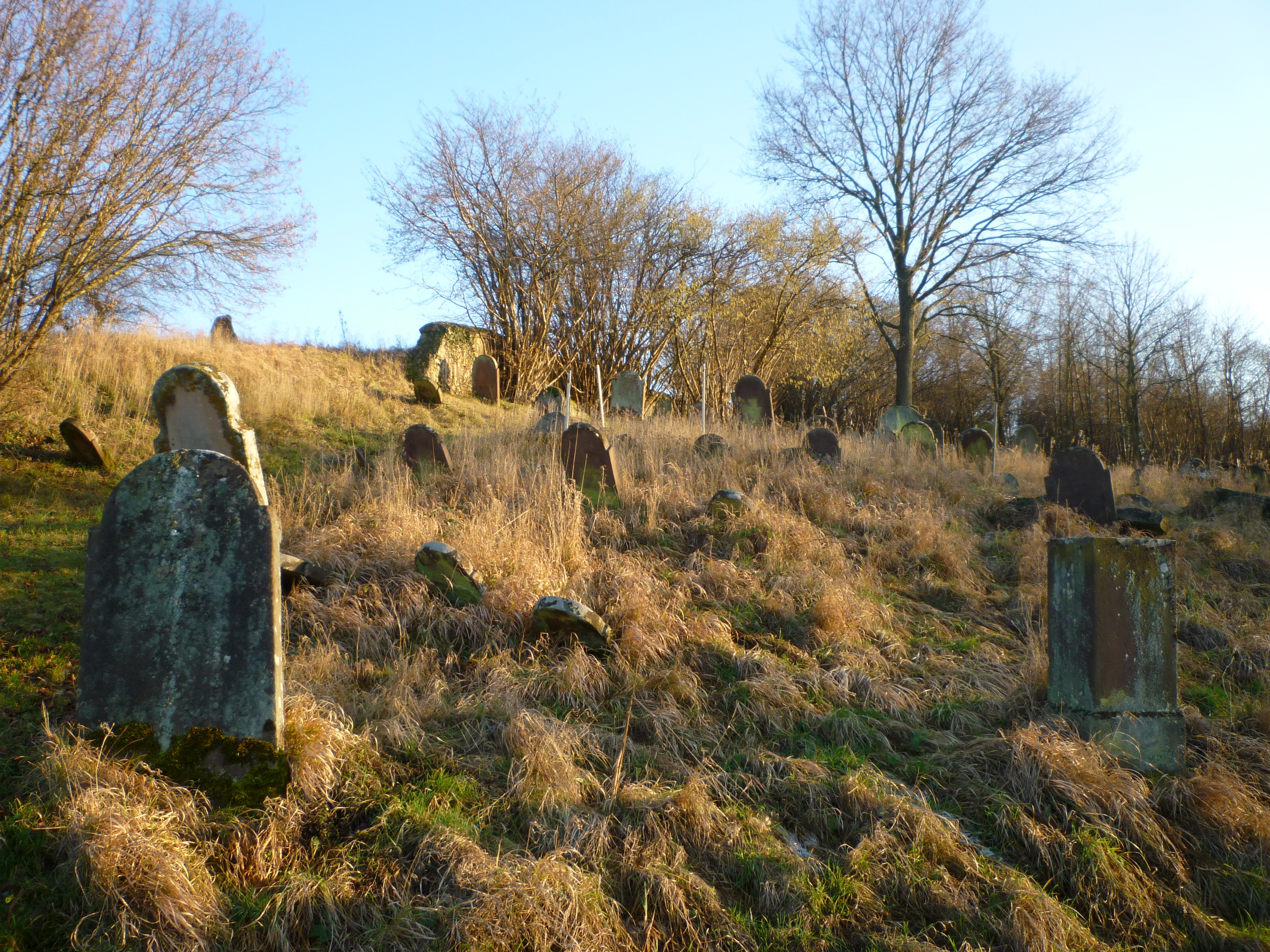 Cimetière juif d'Ettendorf